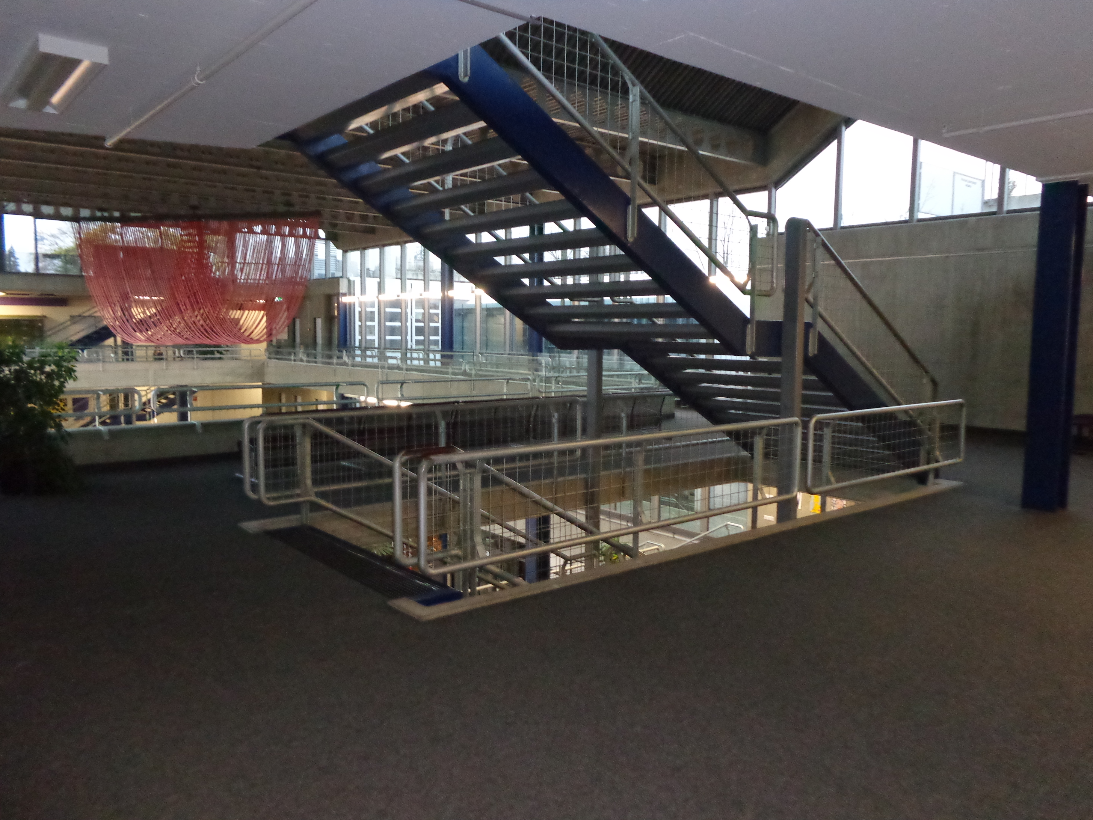 Freies Gymnasium Bern, Treppenbereich im Südflügel. Die beiden Treppen führen aufs Dach und in den ersten Stock.